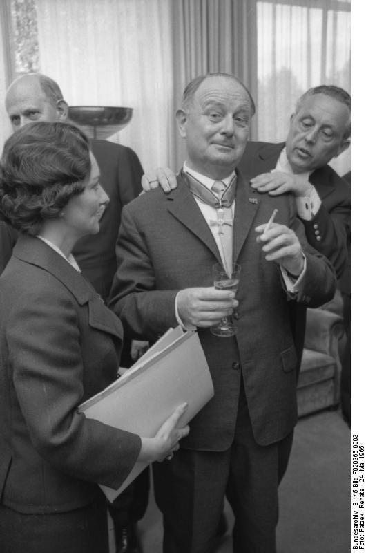 Empfang und Ordensverleihung an Bundestagsabg. durch Bundestagspräsident Dr. Gerstenmaier Bonn [mit Orden: Direktor beim Deutschen Bundestag - Hans Troßmann]